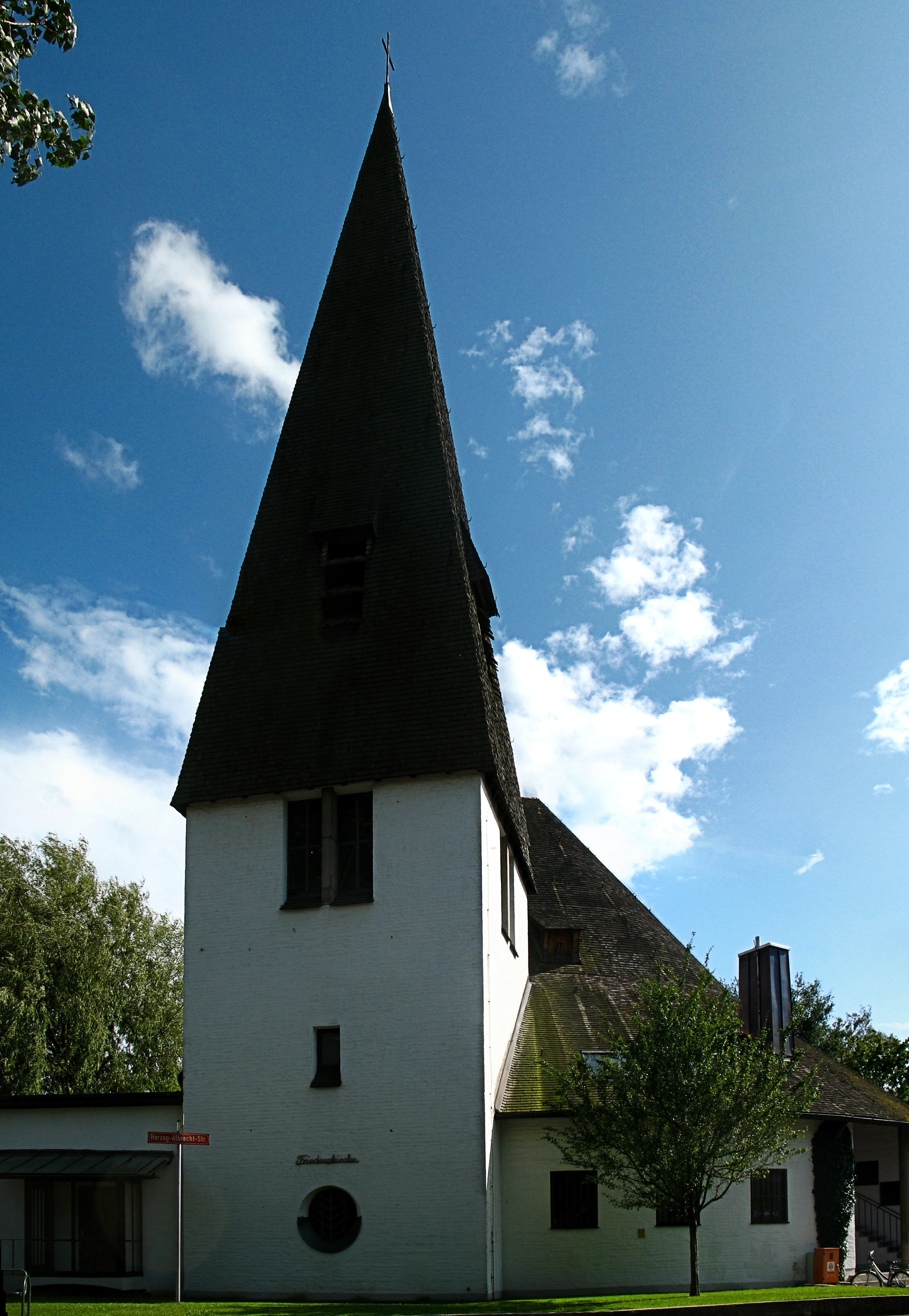 Deutschland, Bayern, Dachau, evangelische Friedenskirche in der Herzog-Albrecht-Straße